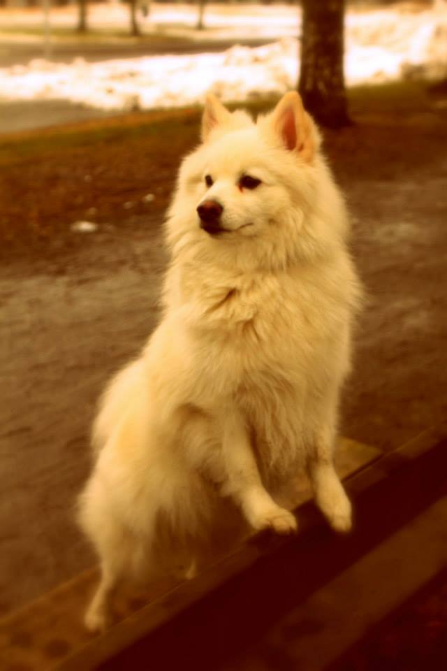 Mittelspitz-narttu